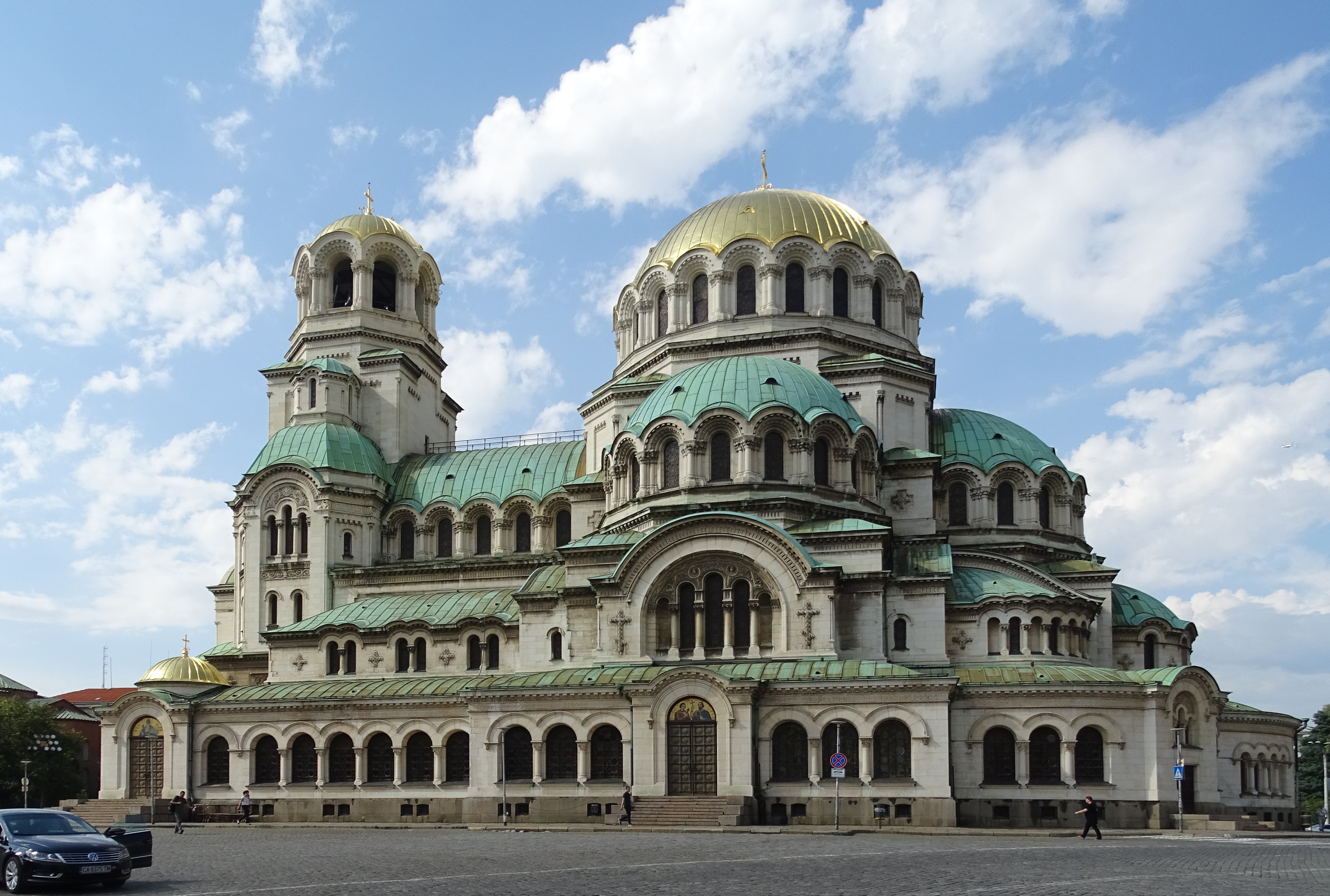 De Alexander Nevski-kathedraal te Sofia, Bulgarije.